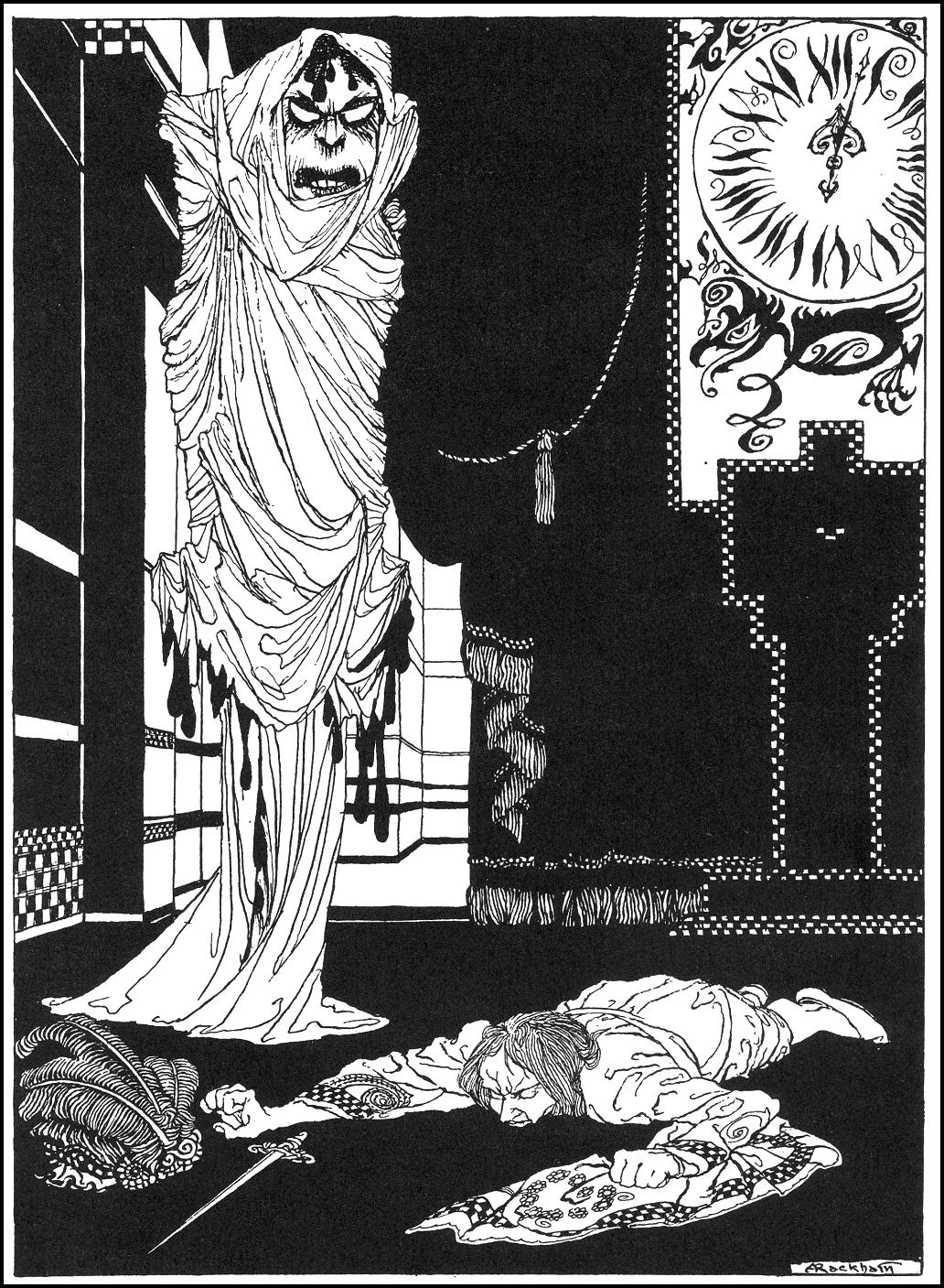 Иллюстрация Артура Рэкхема из книги "Poe's Tales of Mystery and Imagination" к рассказу Эдгара По "Маска Красной Смерти"